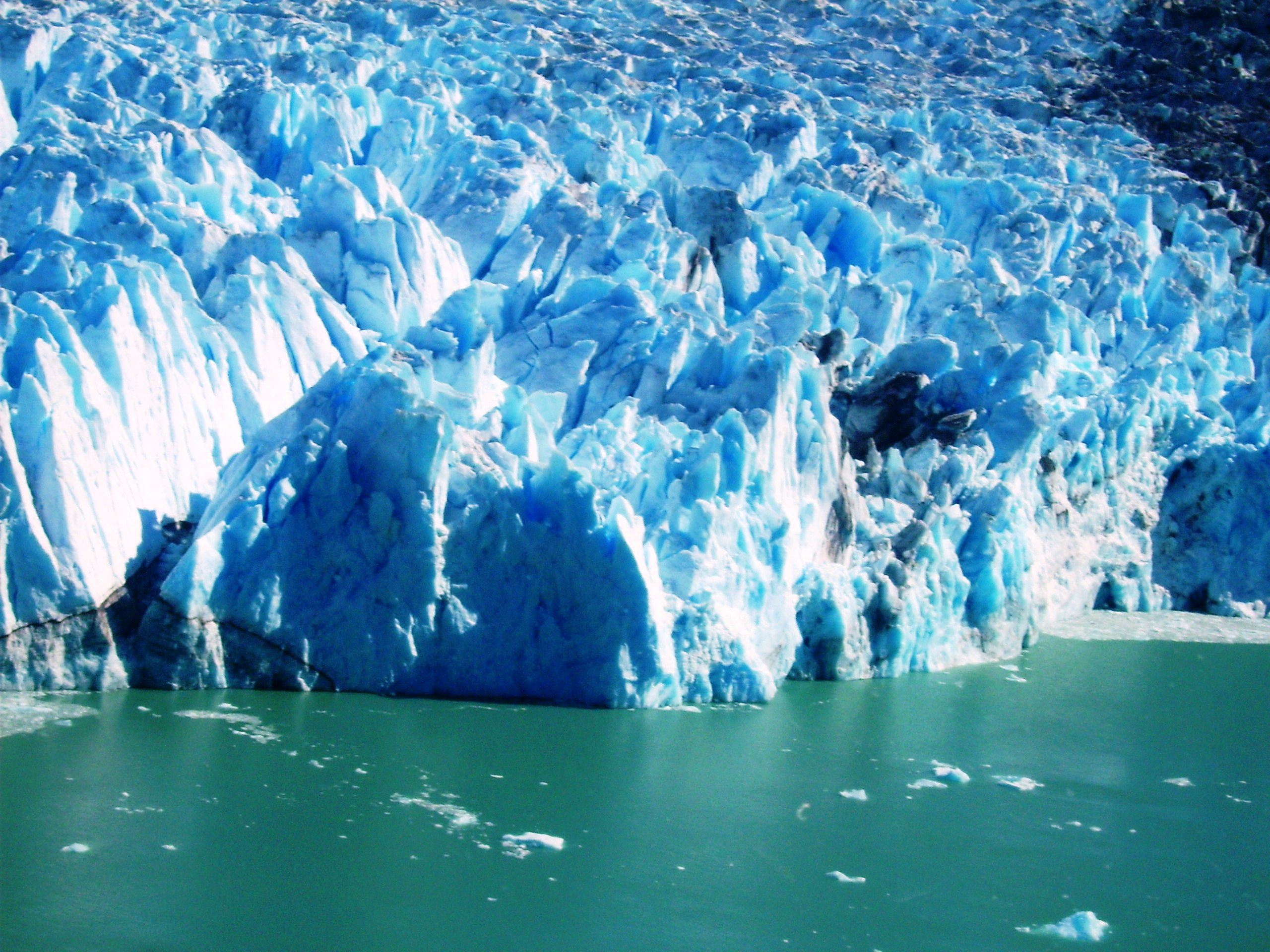 Pared del glaciar, de 80 m sobre aguas lago O'Higgins